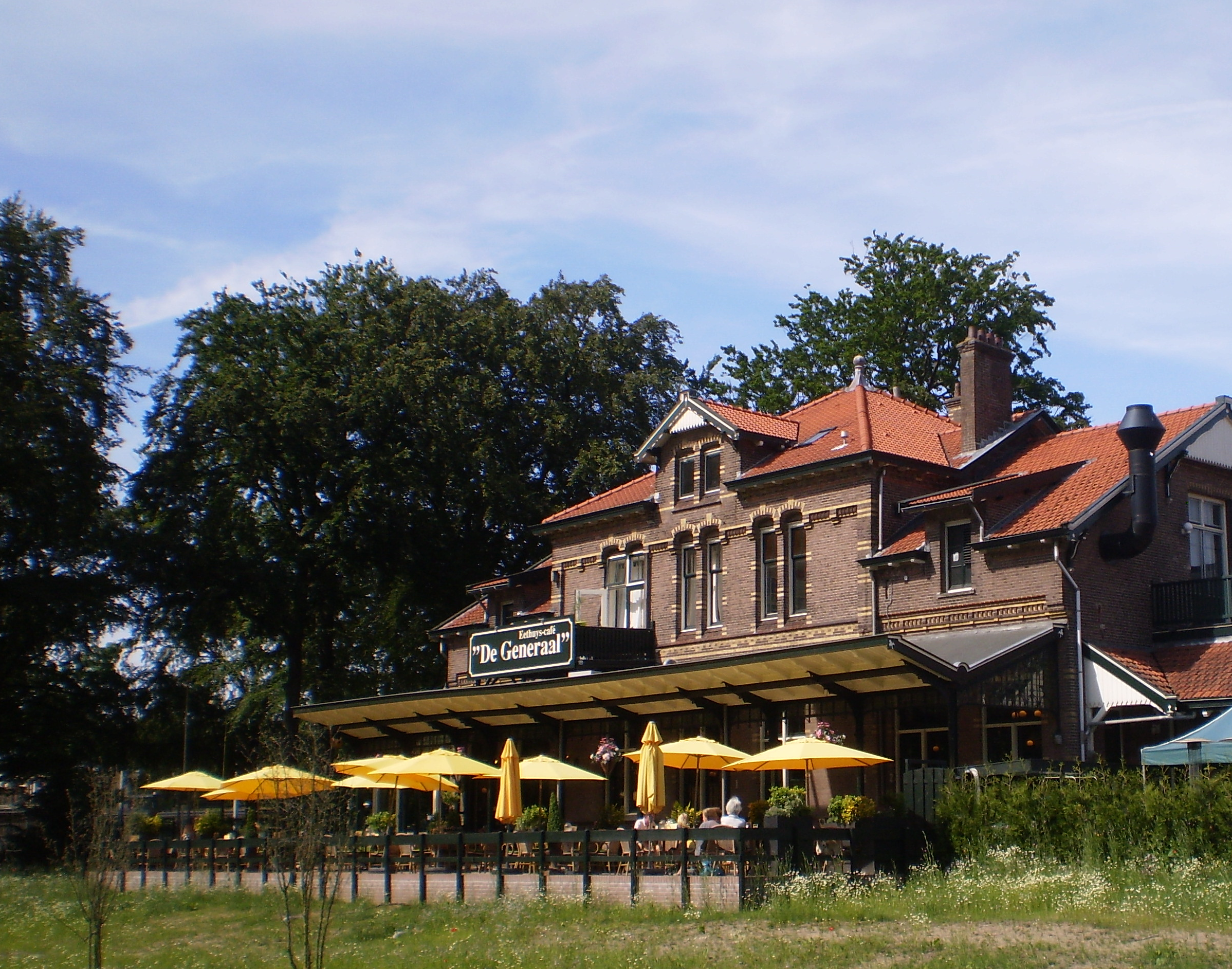 Buurtstation zijde Baarsche Bos